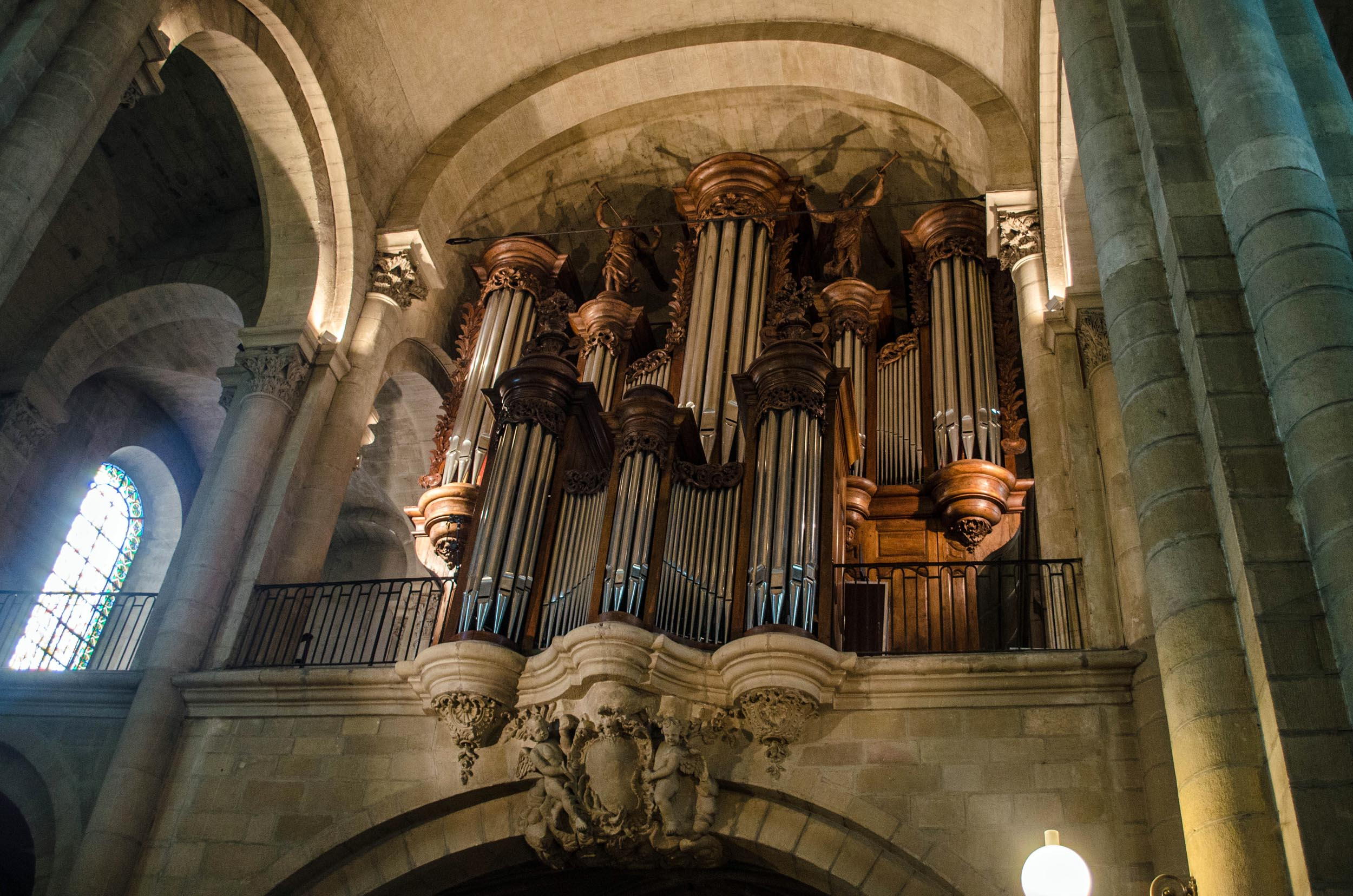 Cathédrale Saint-Apollinaire de Valence (Drôme, France) : orgue